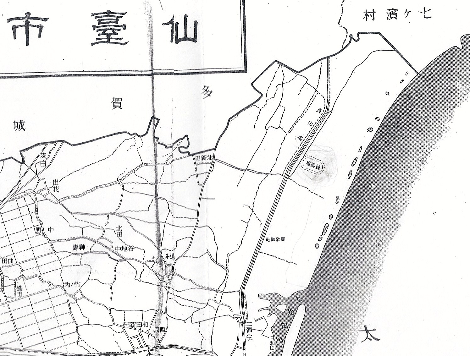 1945年（昭和20年）4月時点の宮城県仙台市の北東部の地図